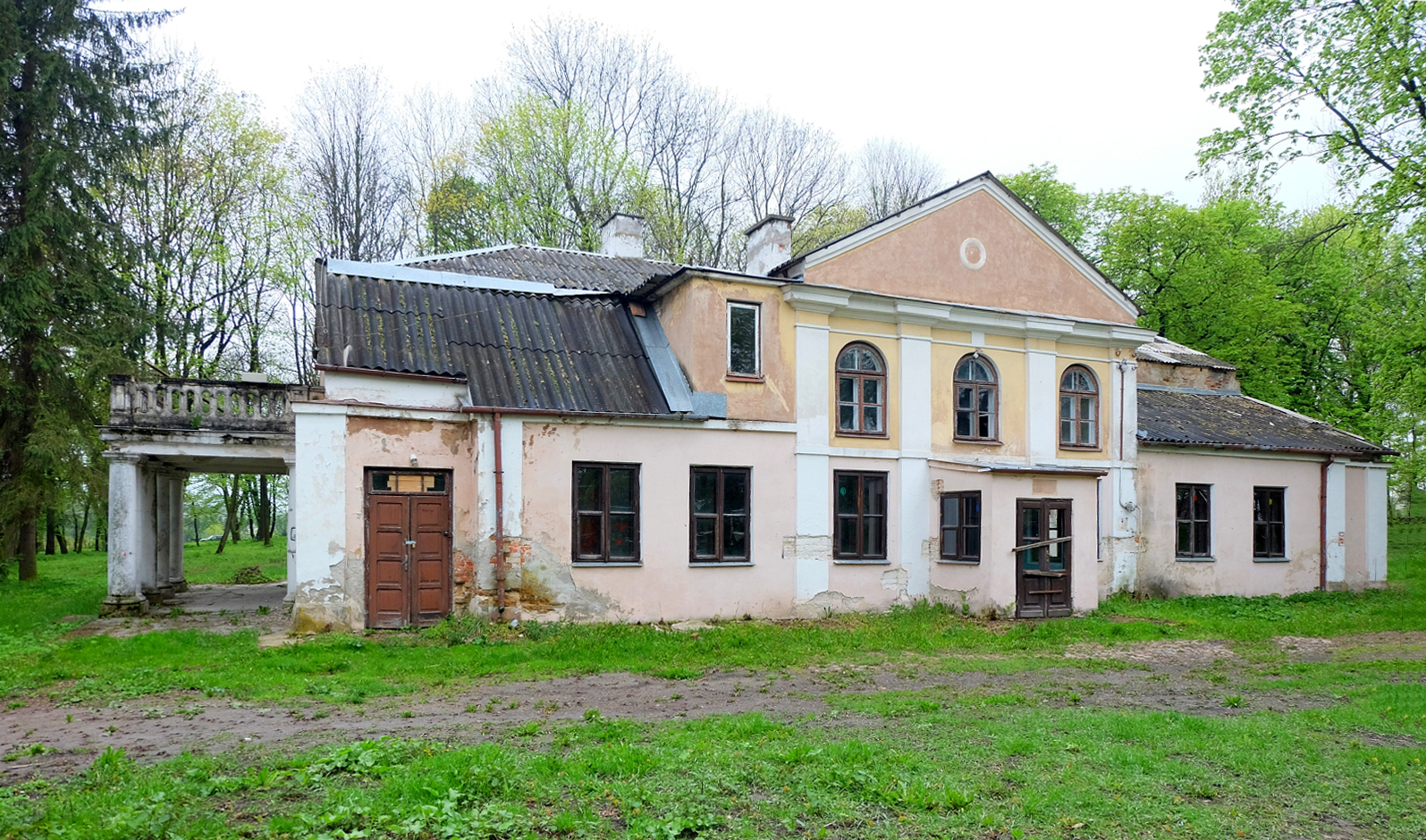 Brzezice, dwór